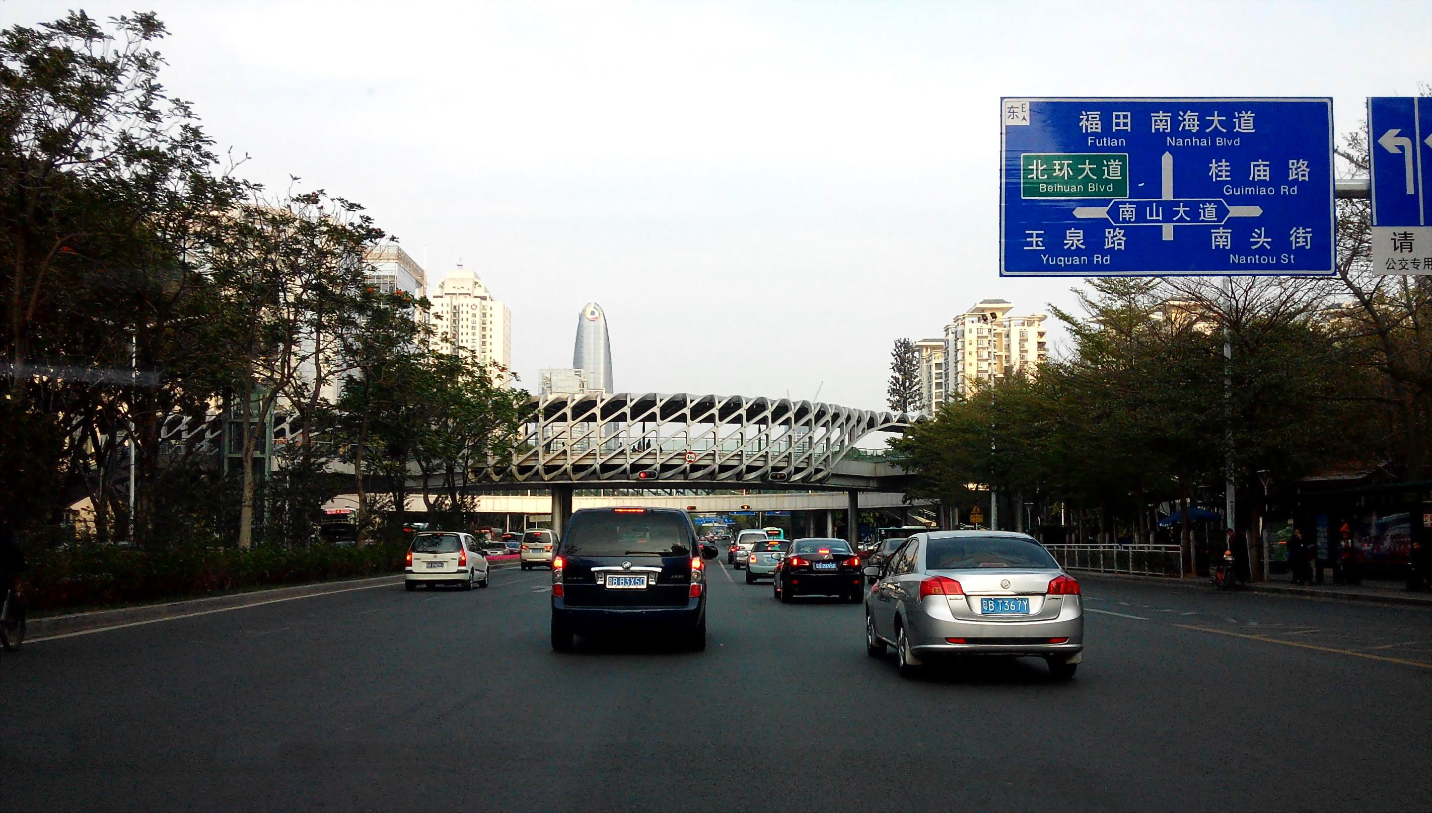 深圳 深南大道 南头段 东向